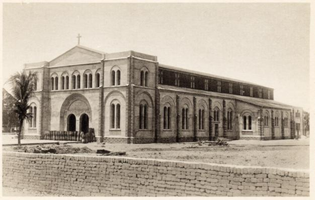 Église Saint-Augustin de Lomé [ou Église d'Apévimé] construite en 1933-1934 à Lomé sous les ordres de Monseigneur Jean-Marie Cessou (1884-1945).